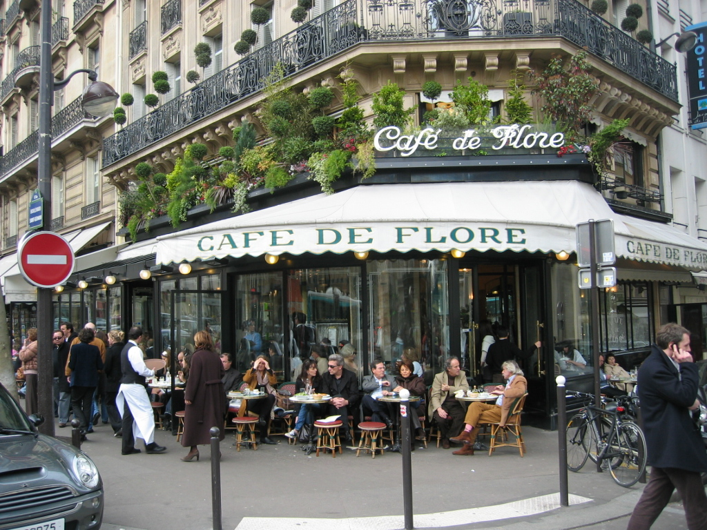 Café de Flore - Quartier Saint Germain - Paris - France